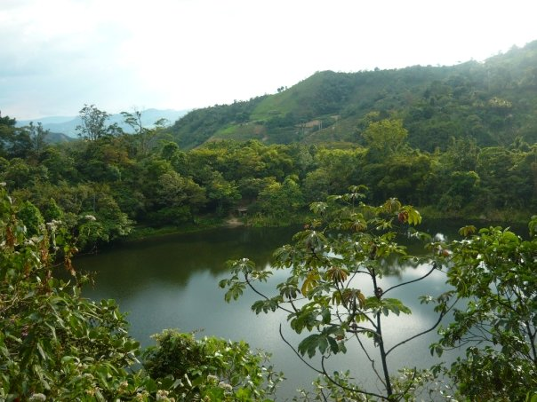 Fotografia De la laguna el tabacal La vega cundinamarca colombia